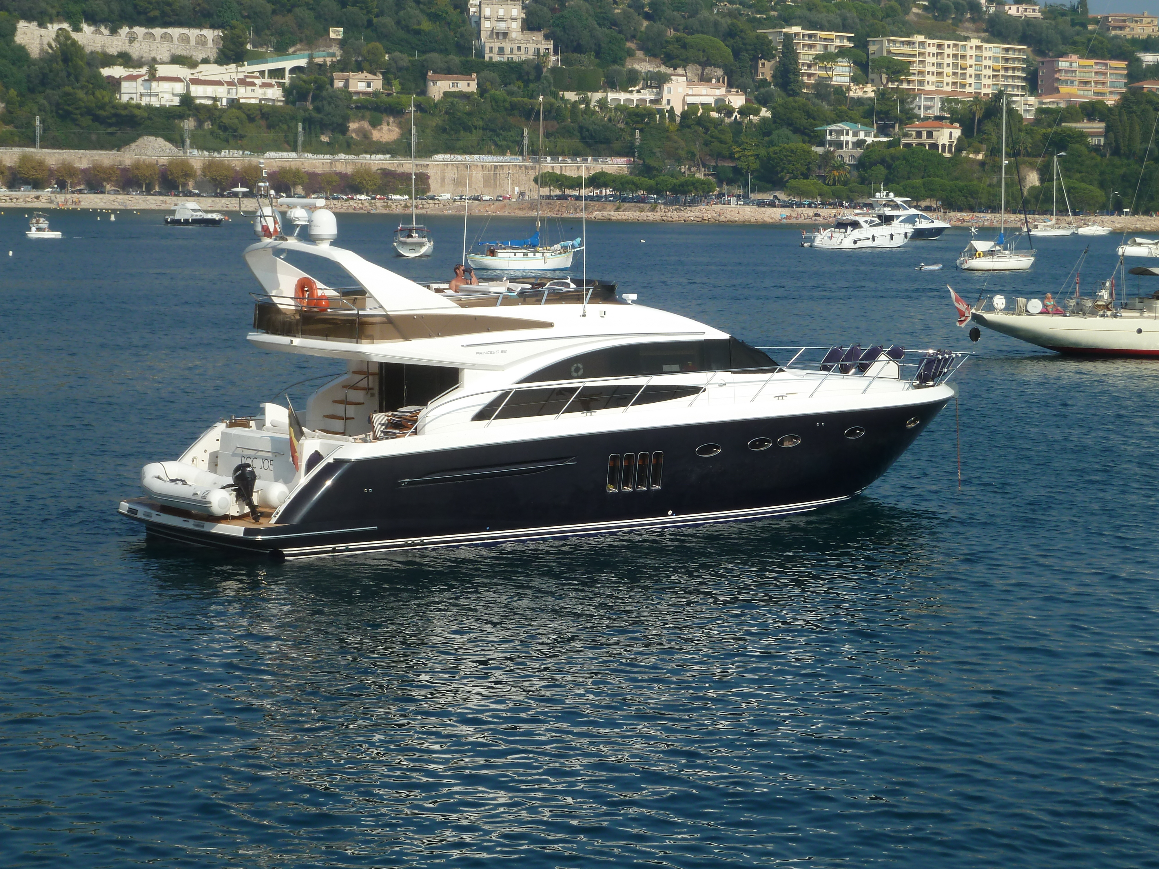 Princess 62 yacht